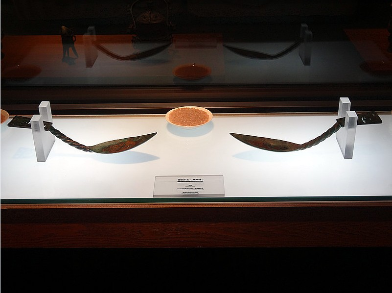 微伯𤼈匕，西周晚期，1967年扶风庄白一号窖藏出土，宝鸡青铜器博物院馆藏